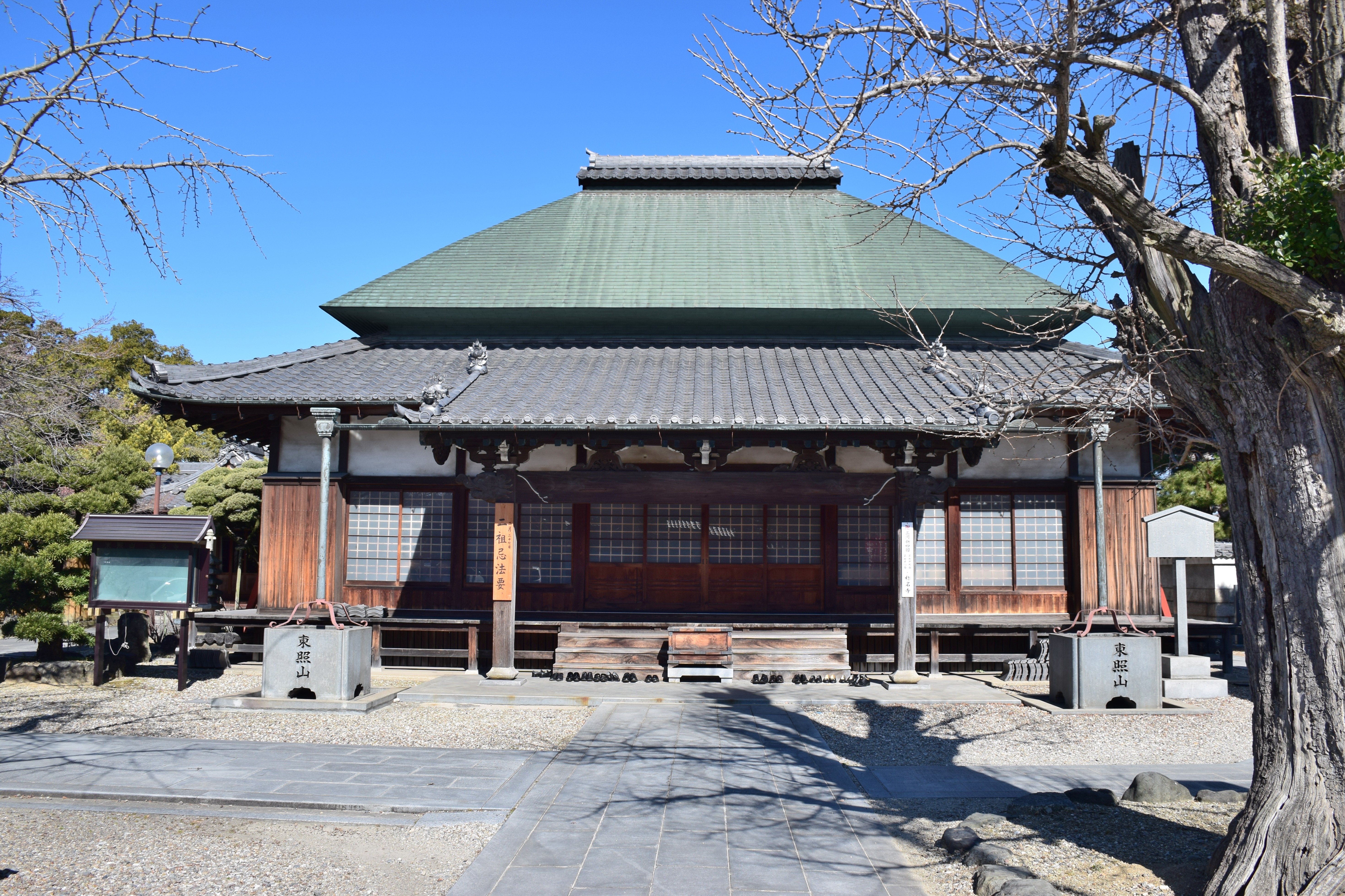 称名寺本堂